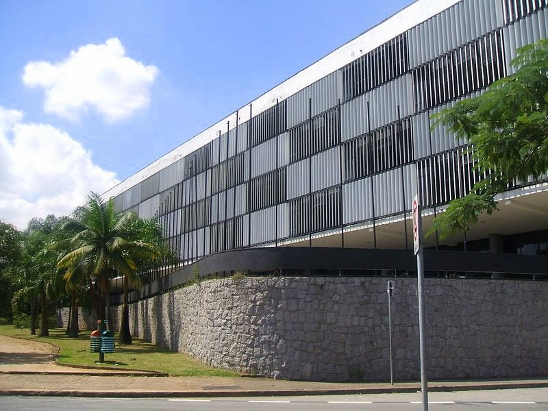 Pavilhão Ciccillo Matarazzo, no Parque do Ibirapuera, São Paulo, Brasil.